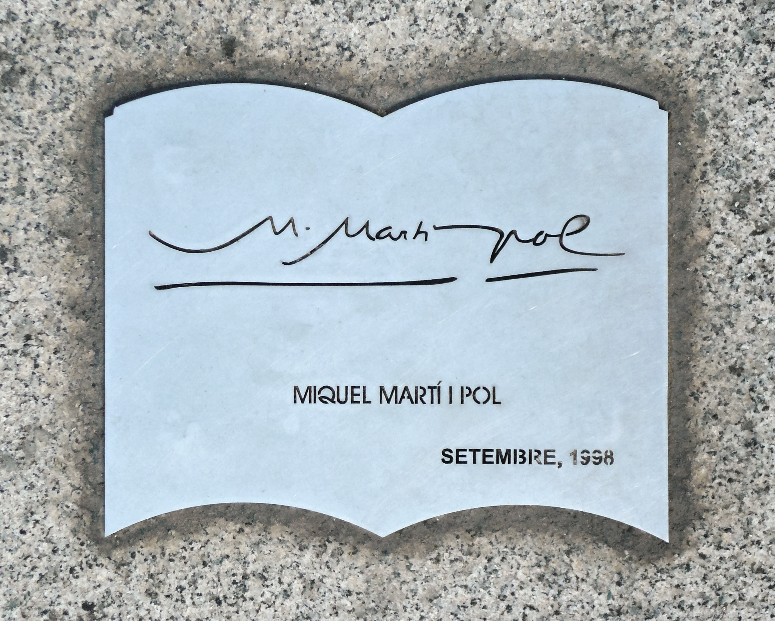 Monument al Llibre, Saltamartí. Gran Via de les Corts Catalanes amb pg. de Gràcia (Barcelona). Escultor: Joan Brossa, signada, amb la col·laboració de Josep Pla-Narbona. Material: planxa pintada d'acer inoxidable -originalment d'acer- sobre base d'acer inoxidable i de granit gris. 1994. 34″ N, 2° 10′ 05.05″ E